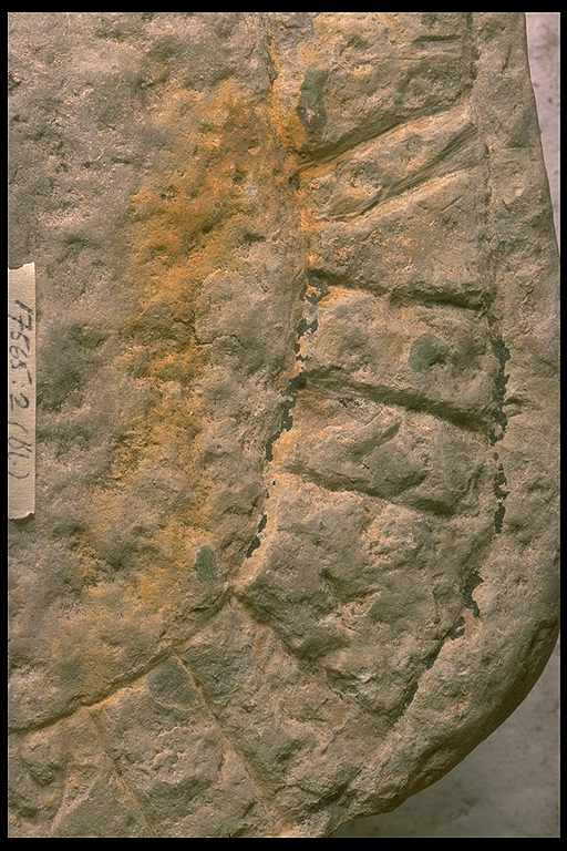 Runstensfragment (Öl17565:2 Köpingsvik). Detalj. Inskriften lyder: .. Sven, de uppreste .. Motiv: Öl Köpingsvik kyrka (flera objekt) Nyckelord: Runor Kategori: Runristning/runsten Runstensfragment (Öl17565:2 Köpingsvik). Detalj. Inskriften lyder: .. Sven, de uppreste.